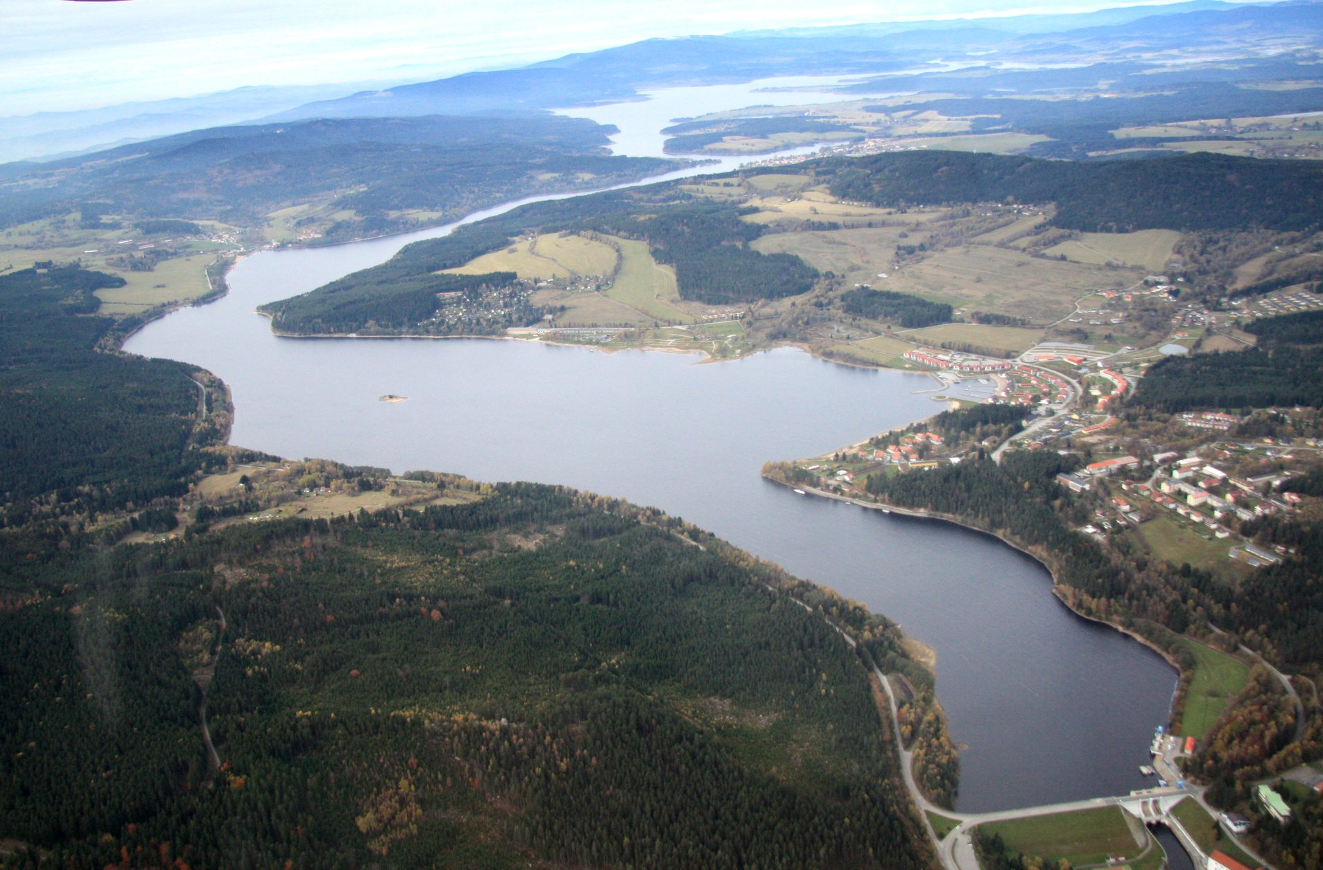 Lipno nad Vltavou